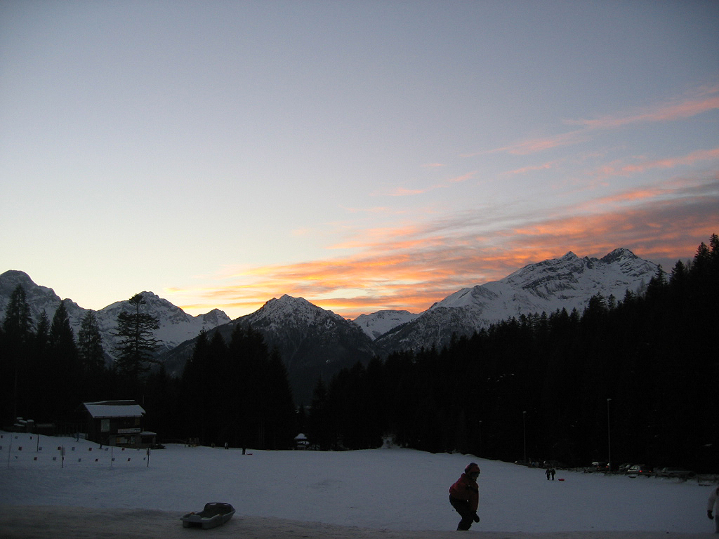 Piste da sci innevate della frazione Spiazzi di Gromo al tramonto